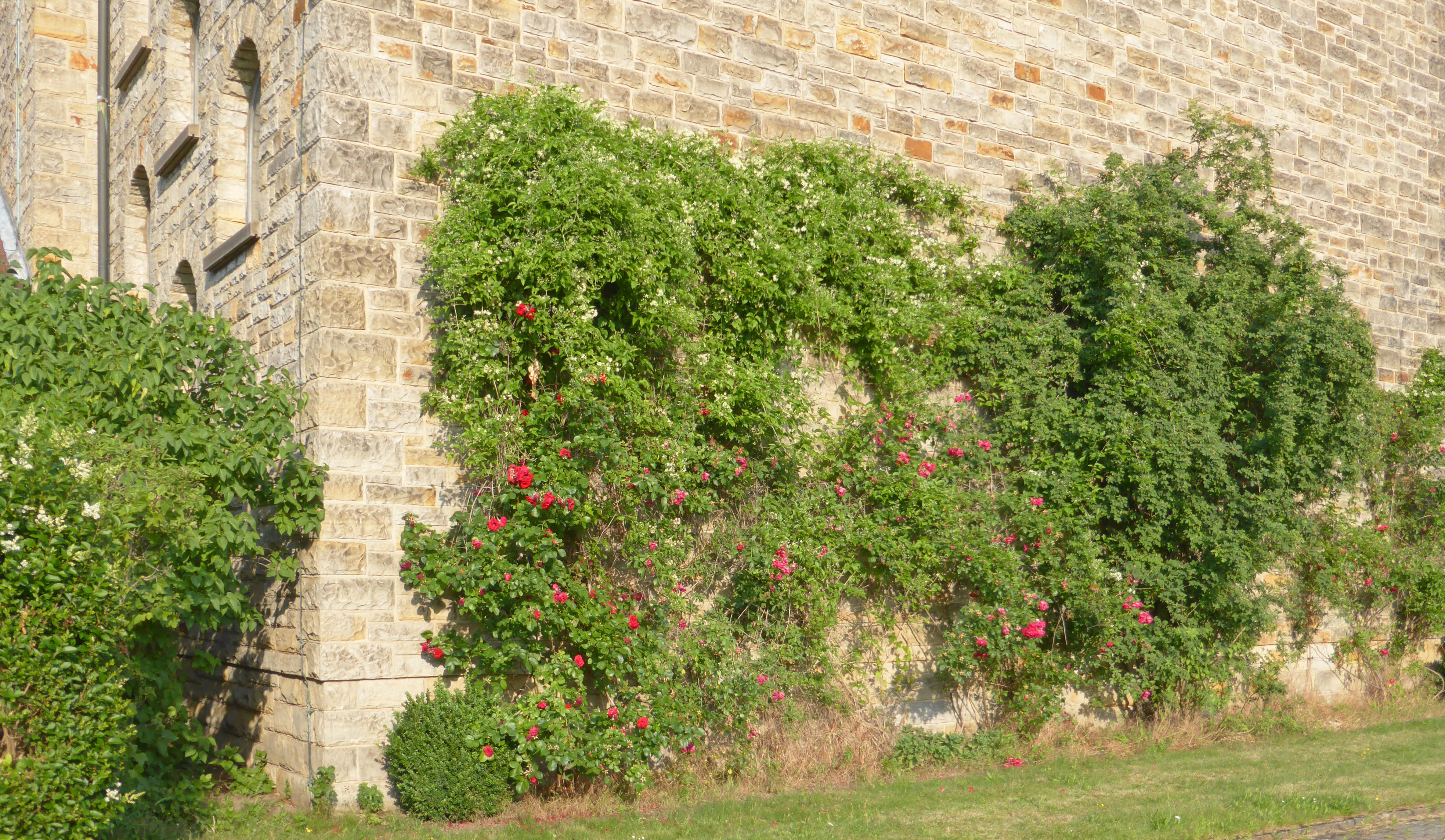 Rosenstock an der Westfassade der St.-Bernward-Kirche in Wolfsburg.